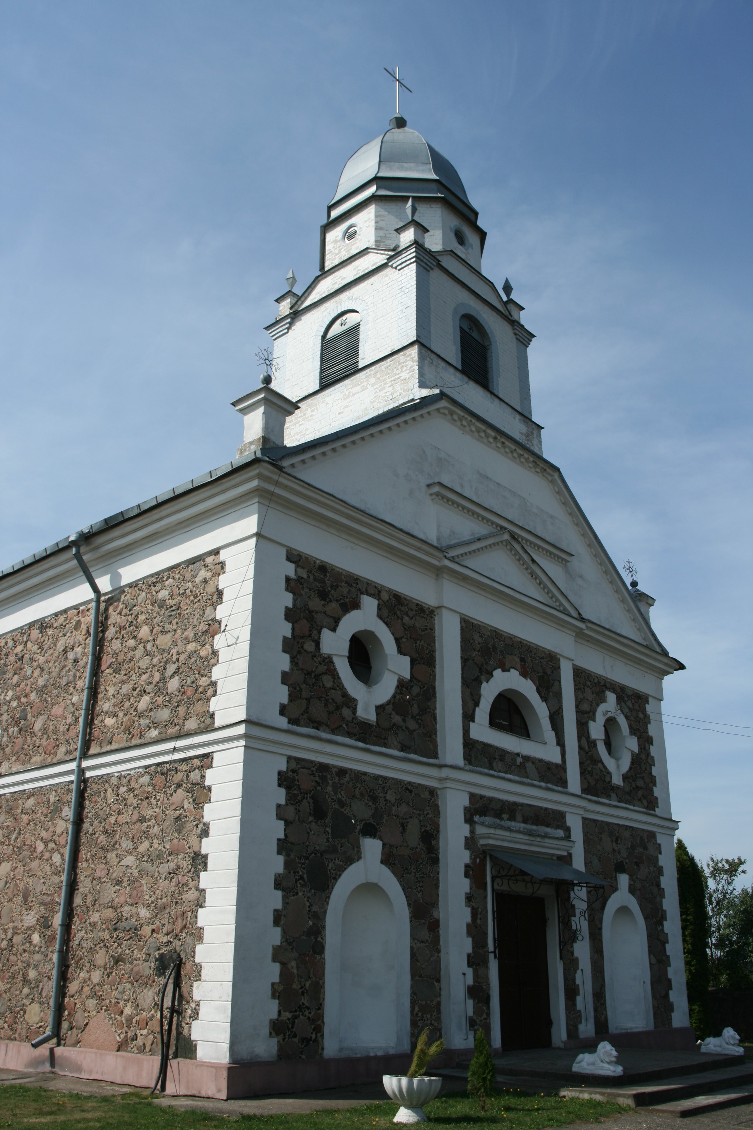 Селіванаўцы, Belarus